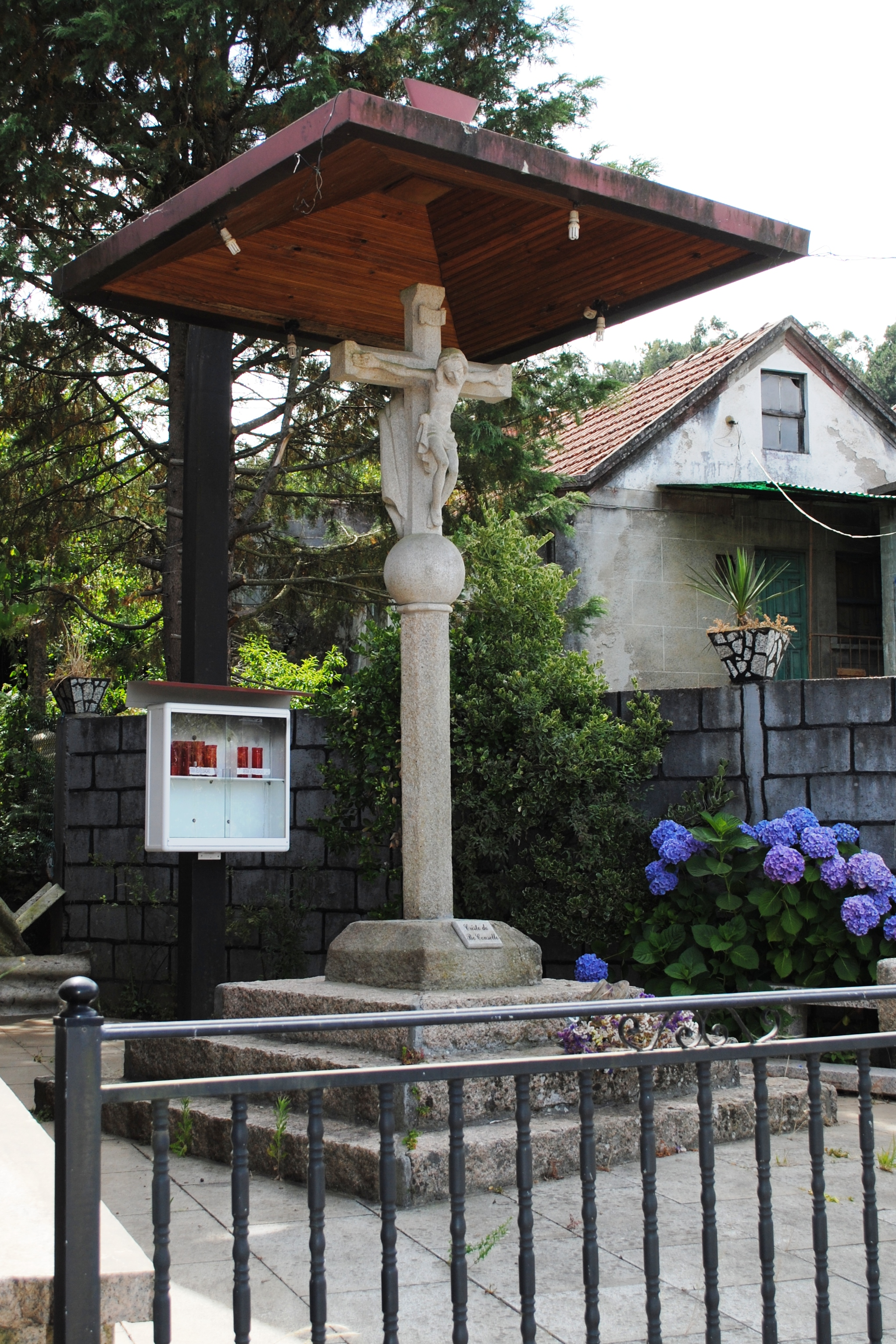 Cristo do Bo Consello, Pedraúcha, Tameiga, Mos